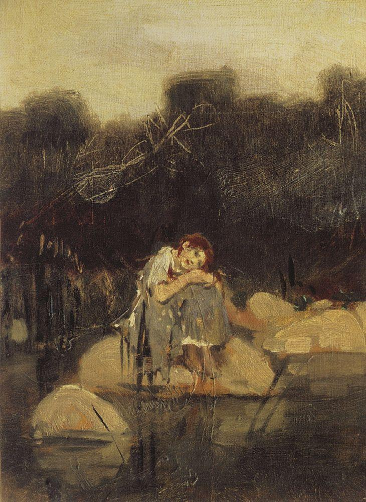 Аленушка. Эскиз Холст, масло. 26,5×19,5. ГТГ Поступила в 1929 г. из Музея иконописи и живописи имени И. С. Остроухова. Произведение записано в инвентарной книге Государственной Третьяковской галереи под номером 11040.